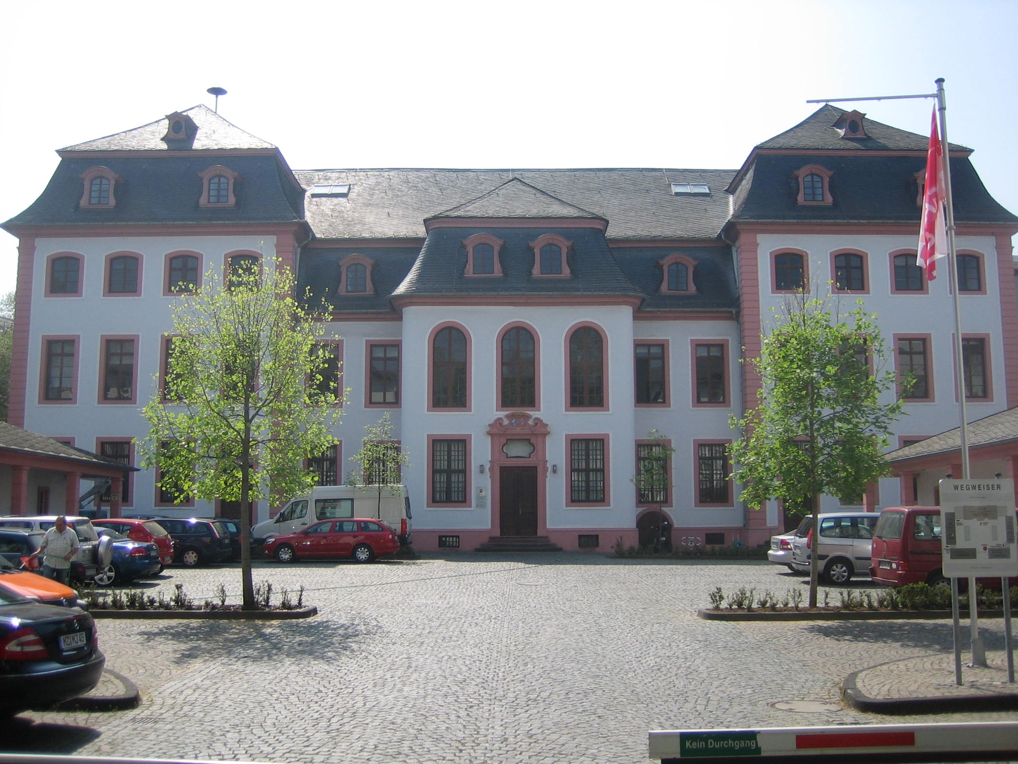 Hofseite des Erthaler Hofs in Mainz zur Umbach hin; nordöstliche Ausrichtung